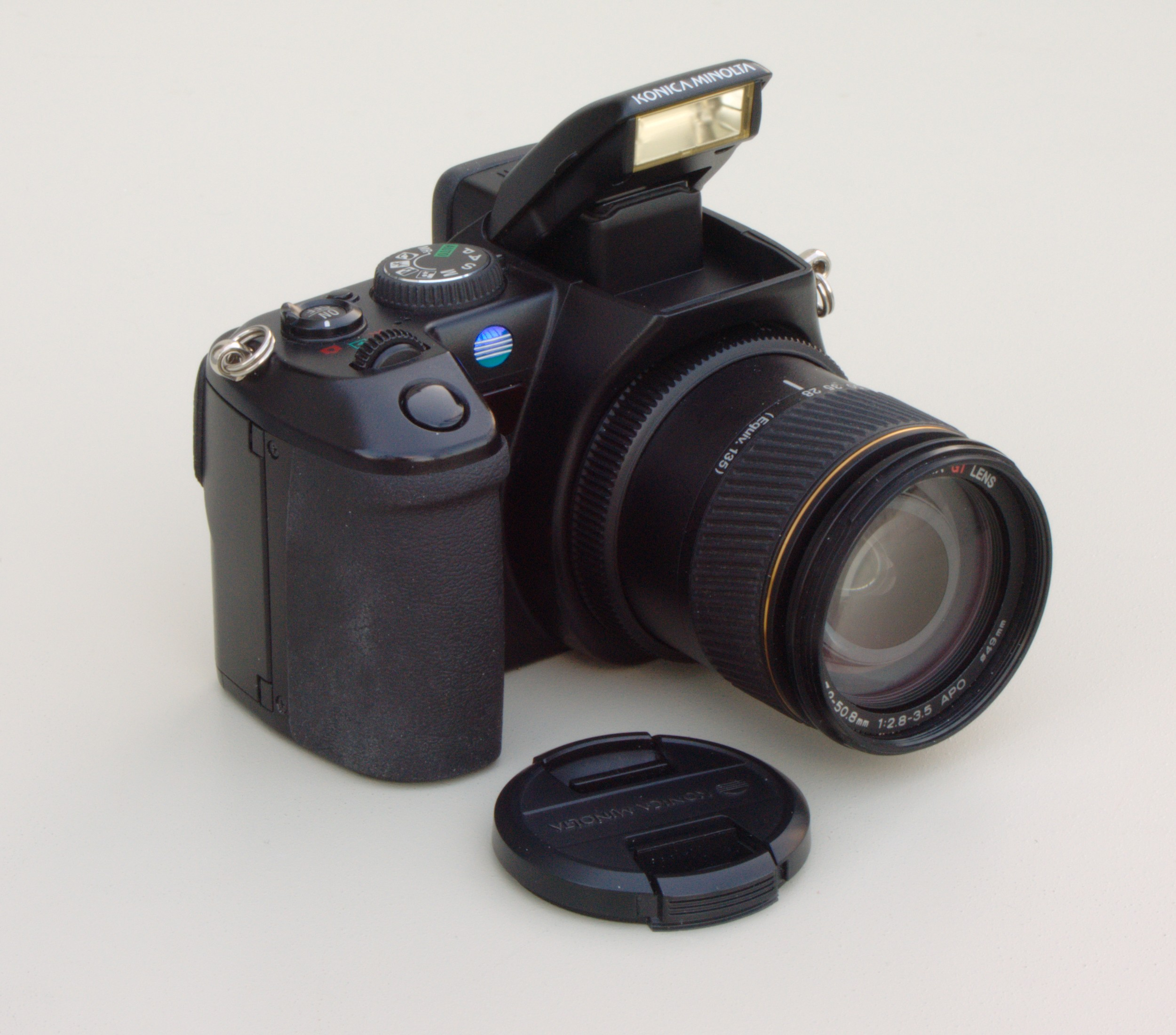 digitale Bridgekamera Dimage A200 der Herstellers Konica Minolta aus dem Jahr 2004 mit aufgeklapptem Blitz und Linsenverschlusskappe